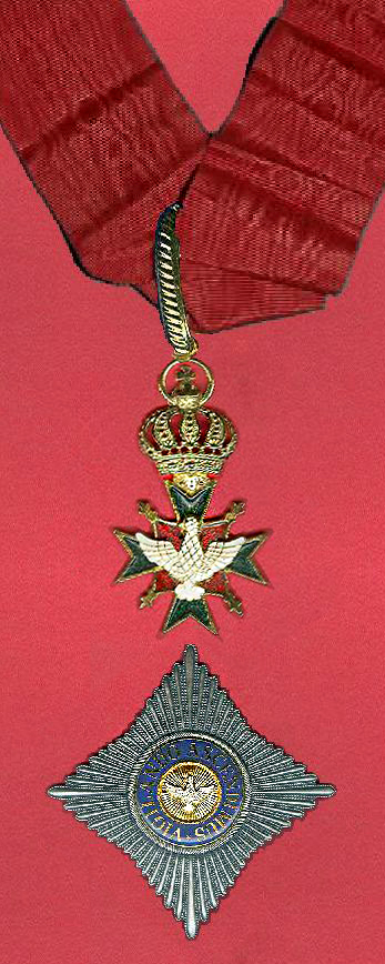 Eigen collectie Eigen scan Er berust geen copyright op dit kruis uit de 18e eeuw Robert Prummel 29 mei 2006 03:31 (CEST)